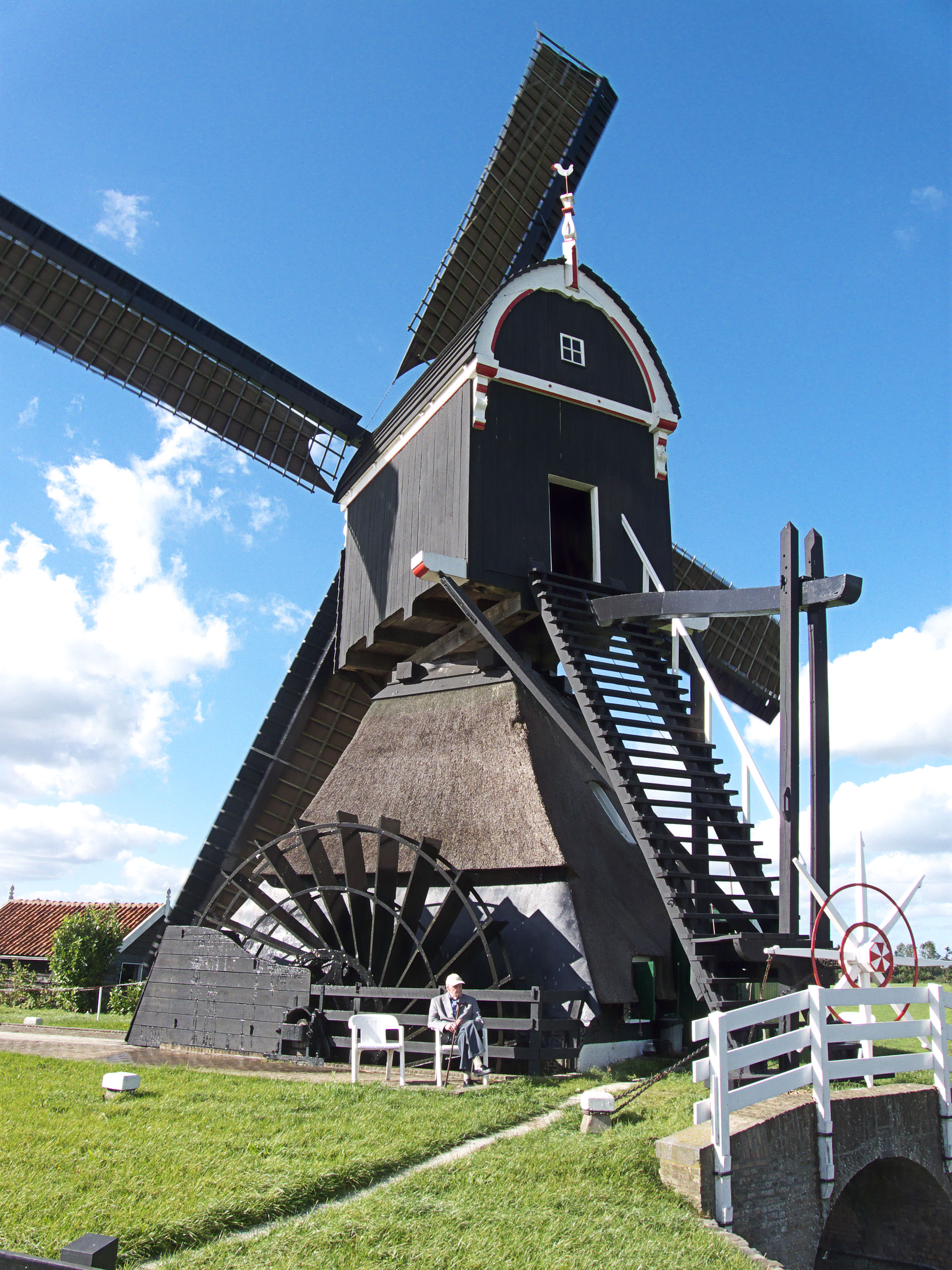 Molen Kleine Tiendwegmolen, Streefkerk